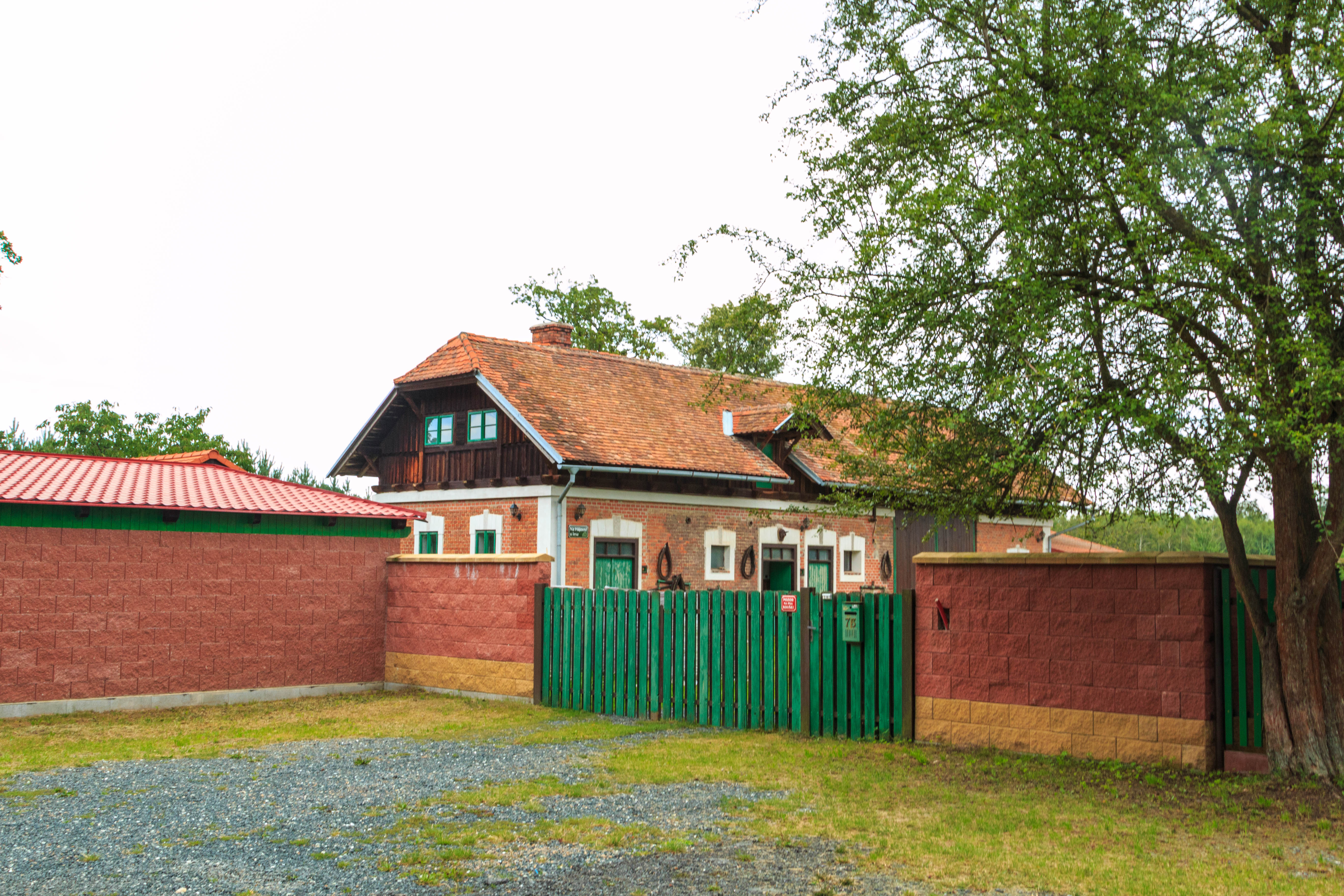 Myslivna, Tetov 73, u silnice mezi Uhlířskou Lhotou a Hradištkem, Tetov.